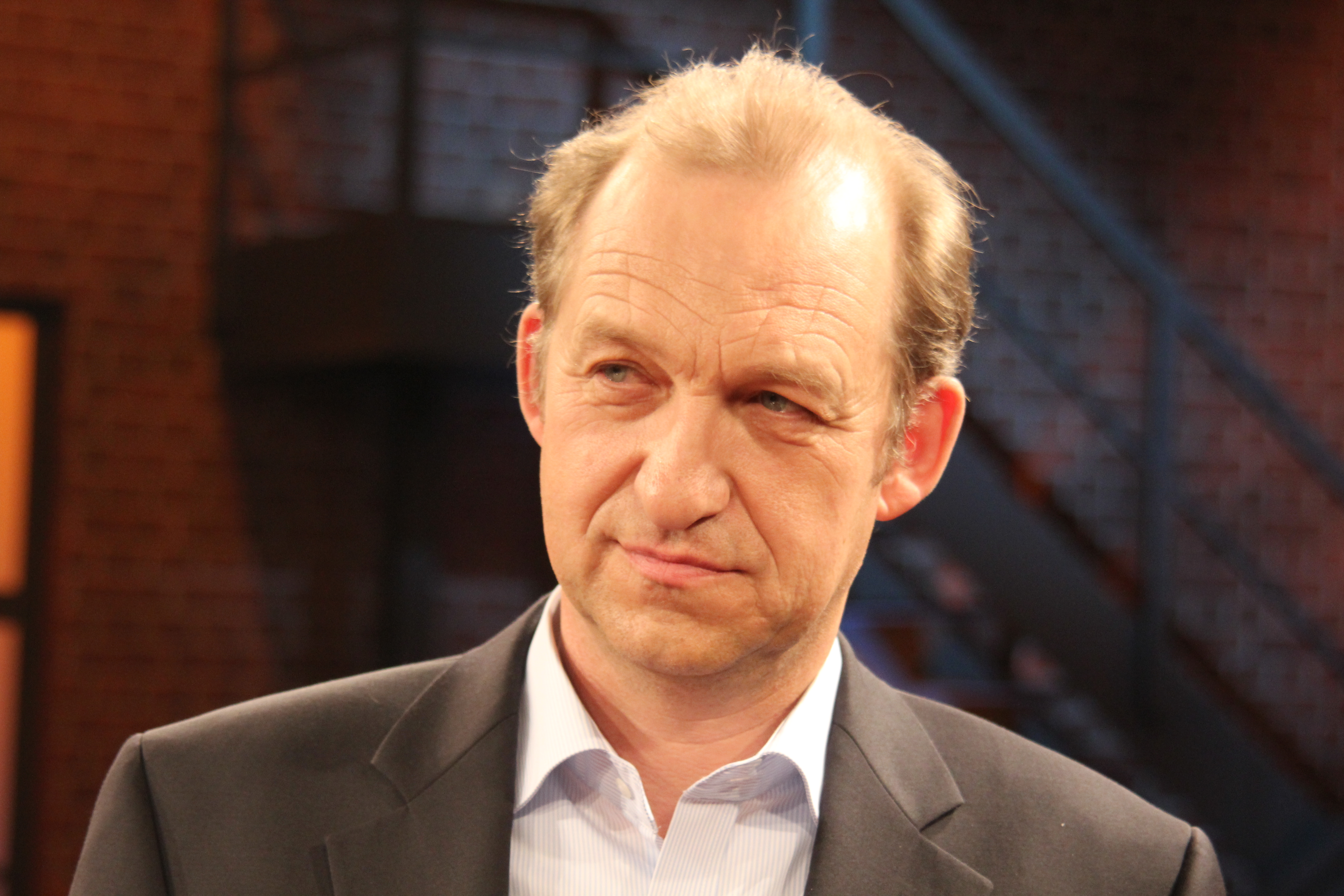 Foto nach der Aufzeichnung des Kölner Treffs, eine Fernsehsendung des Westdeutschen Rundfunks